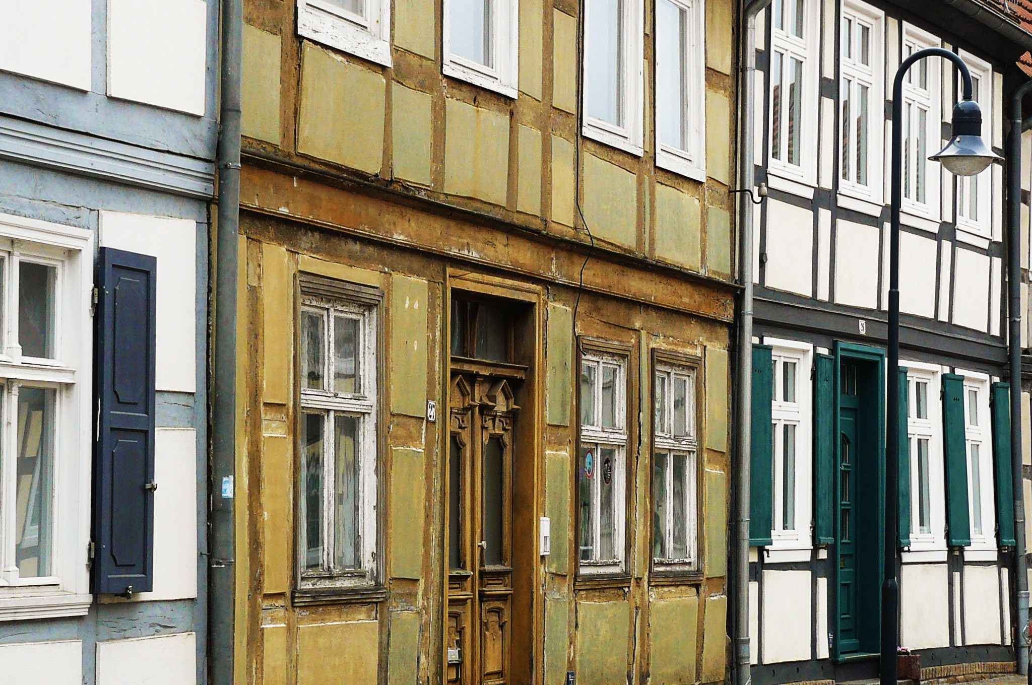 Zabudowa szachulcowa w Pritzwalk.